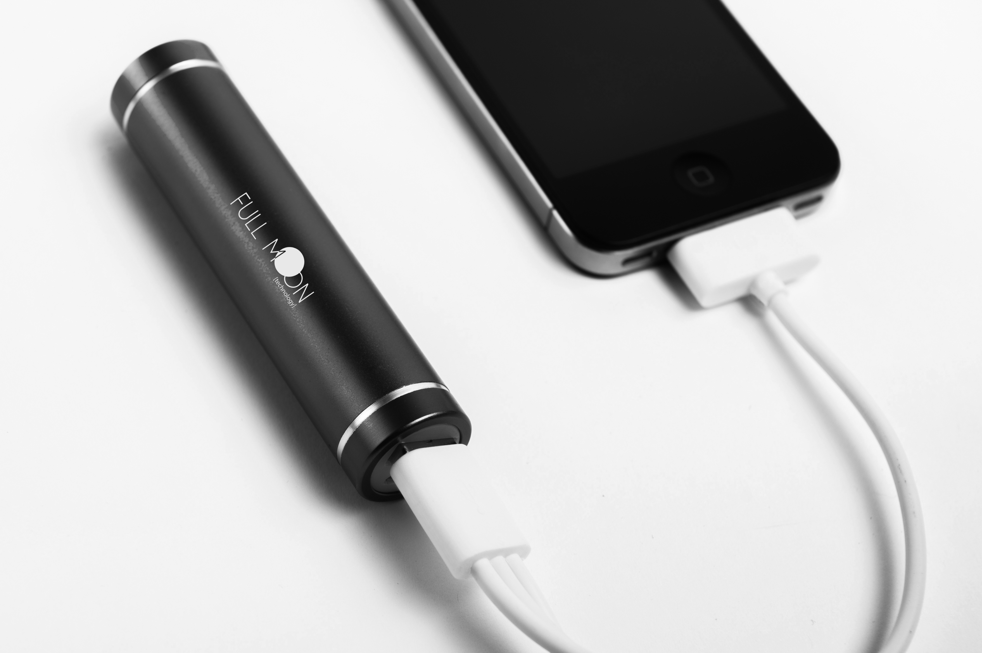 Es una Power Bank de la marca Full Moon que está cargando un teléfono móvil.